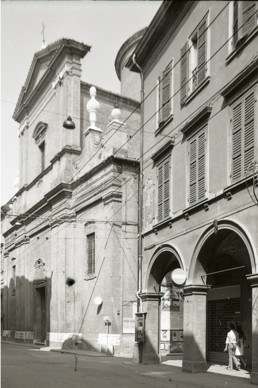 Servizio fotografico : Modena, Chiesa di San Carlo, 1973 / Paolo Monti. - Strisce: 7, Fotogrammi complessivi: 36 : Negativo b/n, gelatina bromuro d'argento/ pellicola ; 35 mm. - ((Sul portanegativi: N[I]K[MA]T FP4. - Occasione: Campagna di rilevamento del centro storico. - , presso Archivio Paolo Monti. - Fonte: Monografia di Orlandi, Piero: Modena: il censimento fotografico dei centri storici, Bologna, IBC (1979). - Fonte: Agenda di Paolo Monti: Leica 1501-3000 Controllo numerazione (1950-1978)